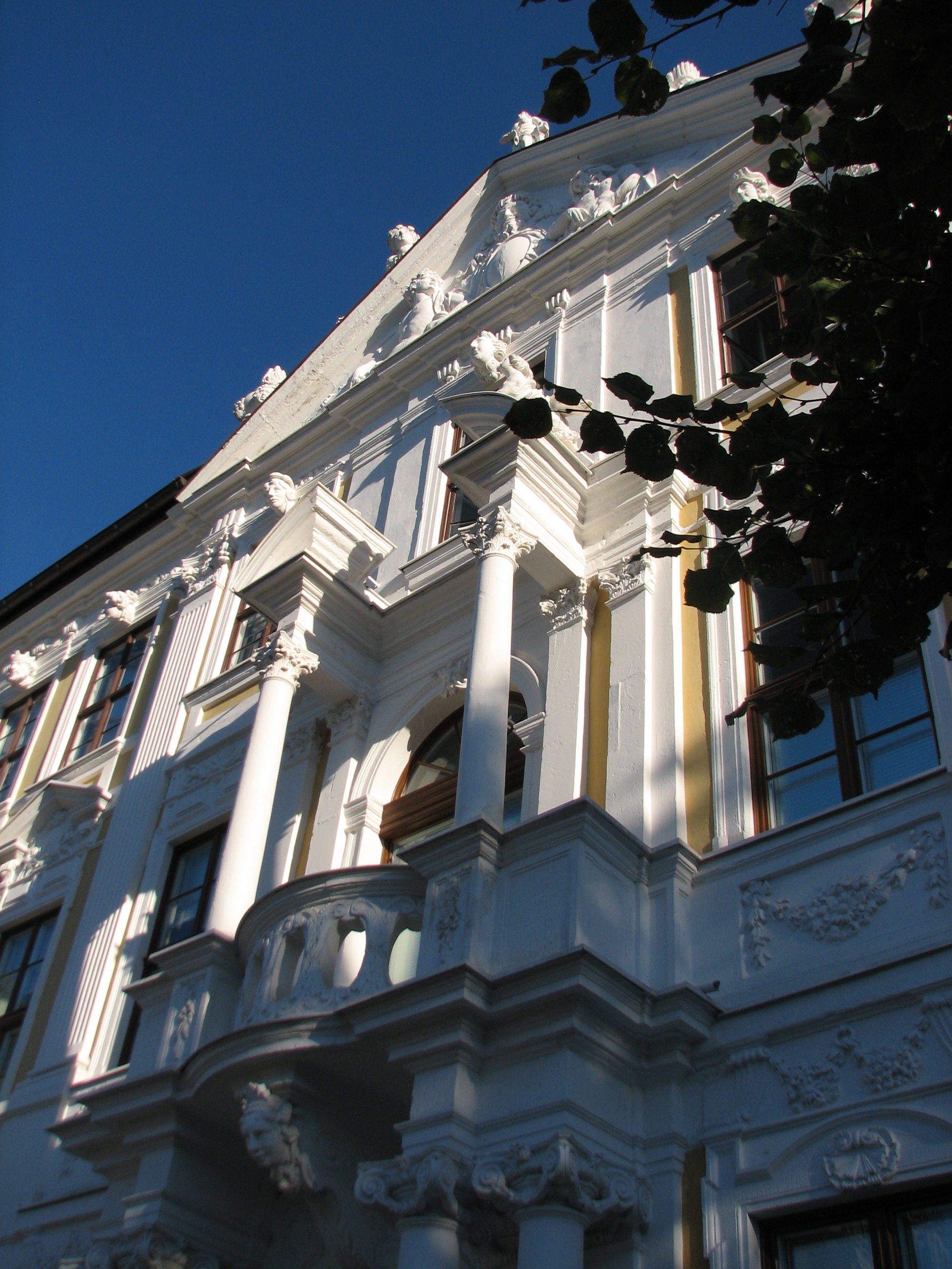 Domplatz 7: Blick auf Balkon und Giebel